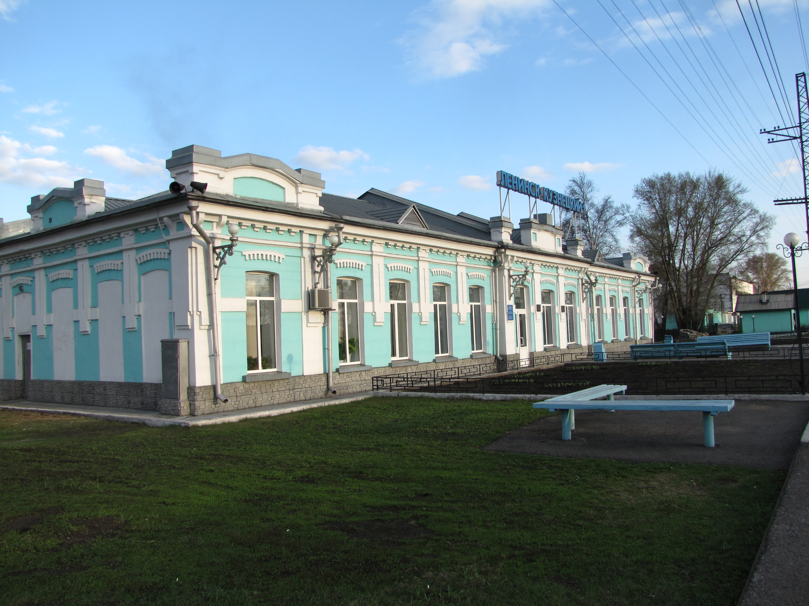 Железнодорожный вокзал станции Кольчугино (Кемеровская область, Ленинск-Кузнецкий, Вокзальная улица, вокзал станции Ленинск-Кузнецкий-1)